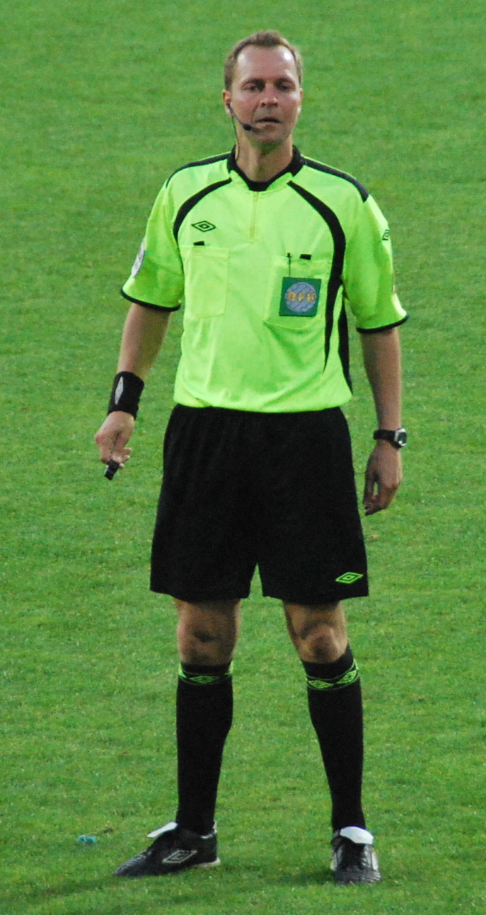 Fodbolddommer Henning Jensen under pokalkampen imellem Viborg FF og AaB på Viborg Stadion.